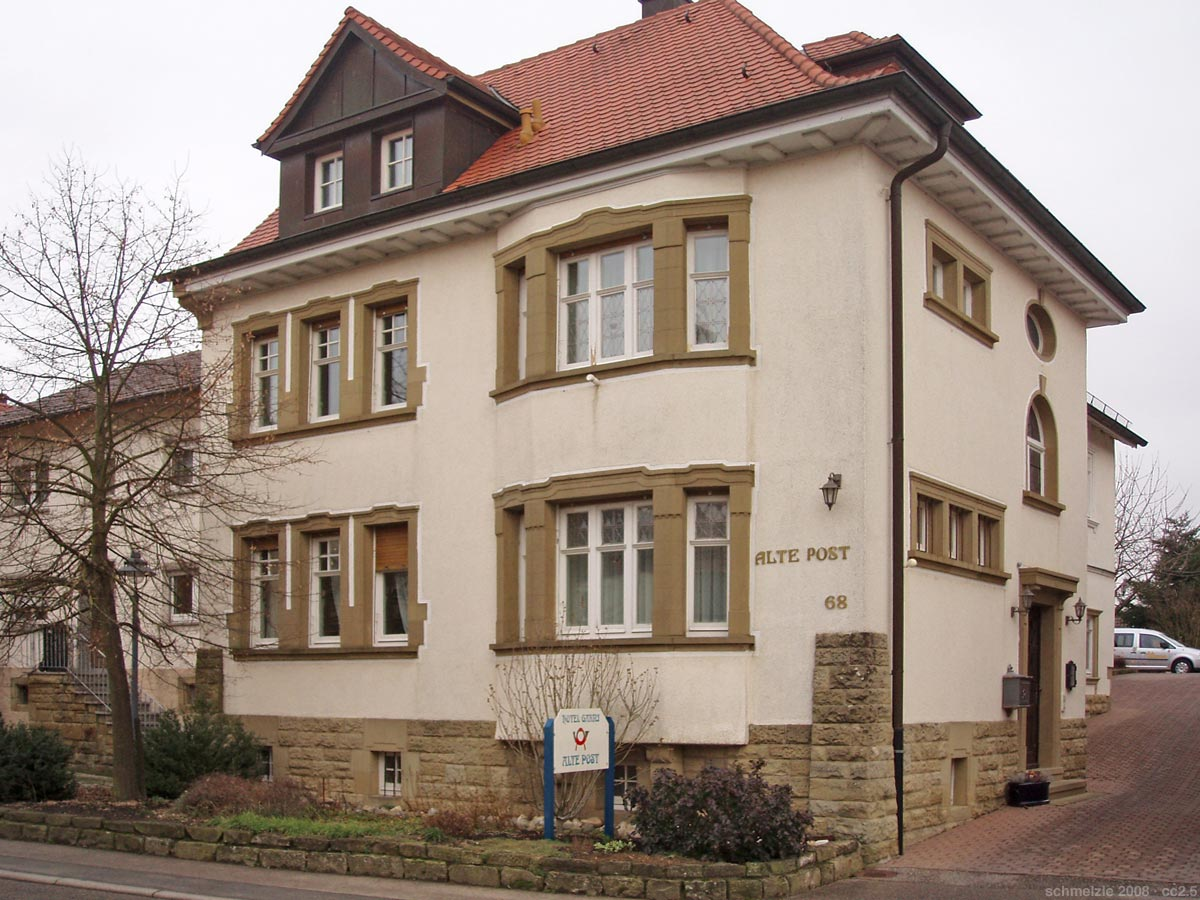 Alte Post, Hauptstr. 68 (erbaut 1912) in Siegelsbach, heute Hotelbetrieb